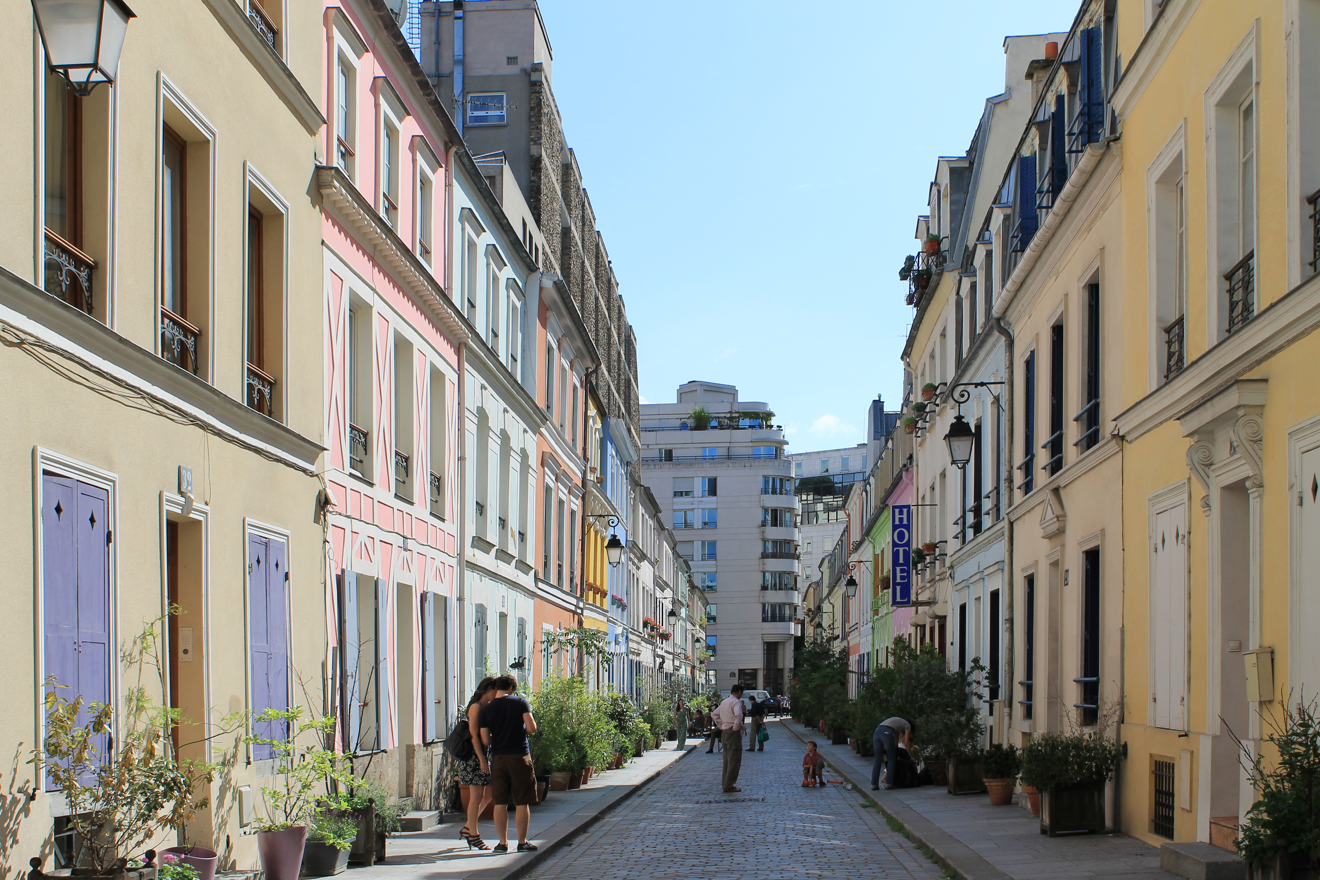 Paris